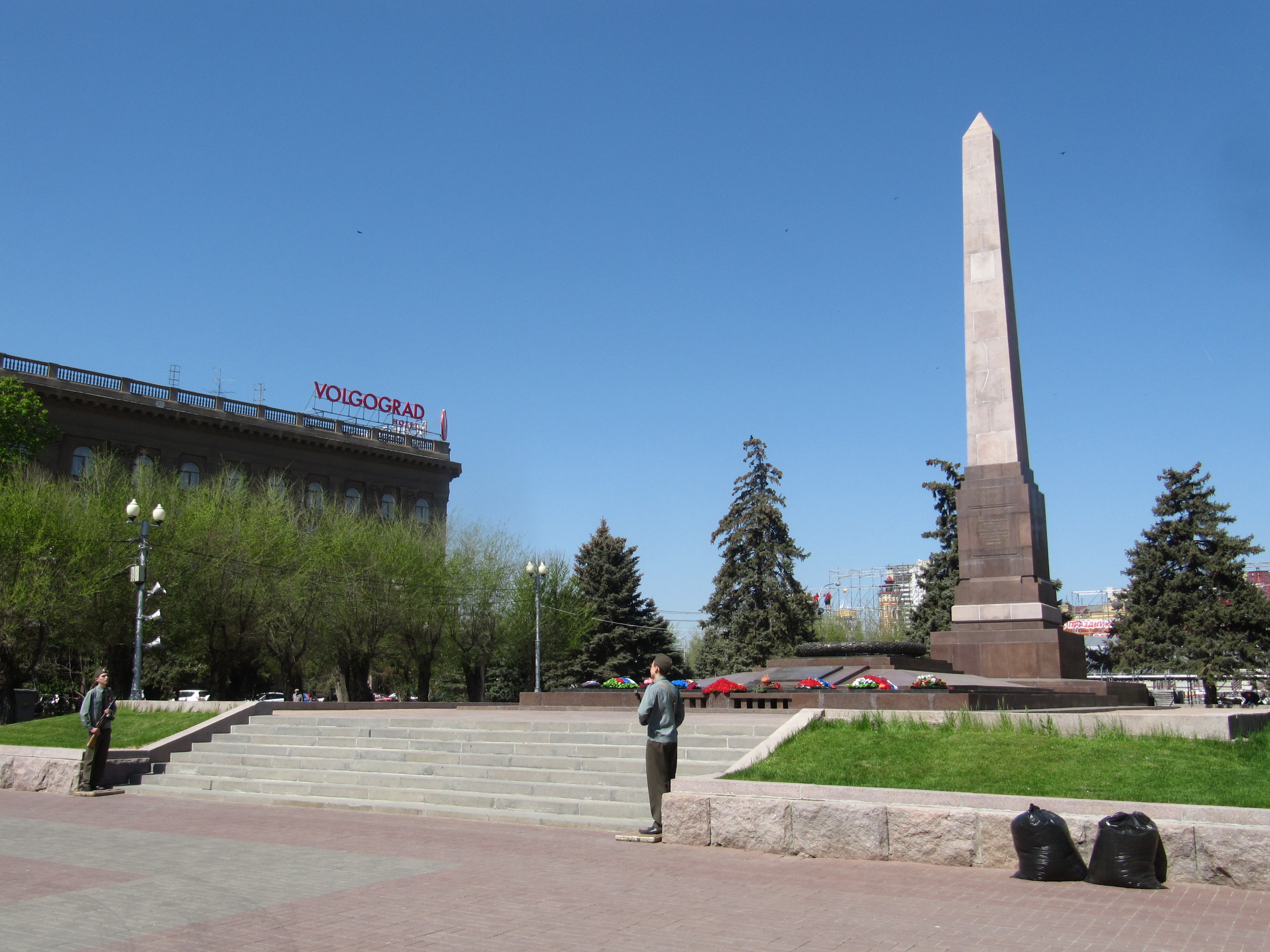 Обелиск на площади Павших борцов, Волгоград